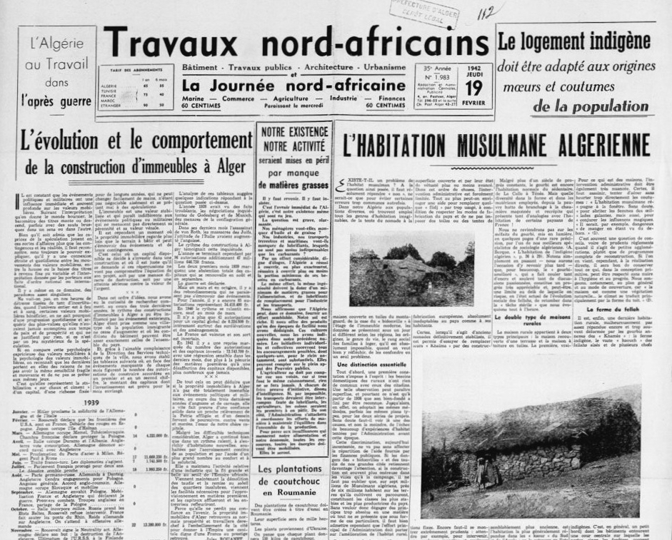 Travaux nord-africains , 19 février 1942, "L'habitation musulmane algérienne".